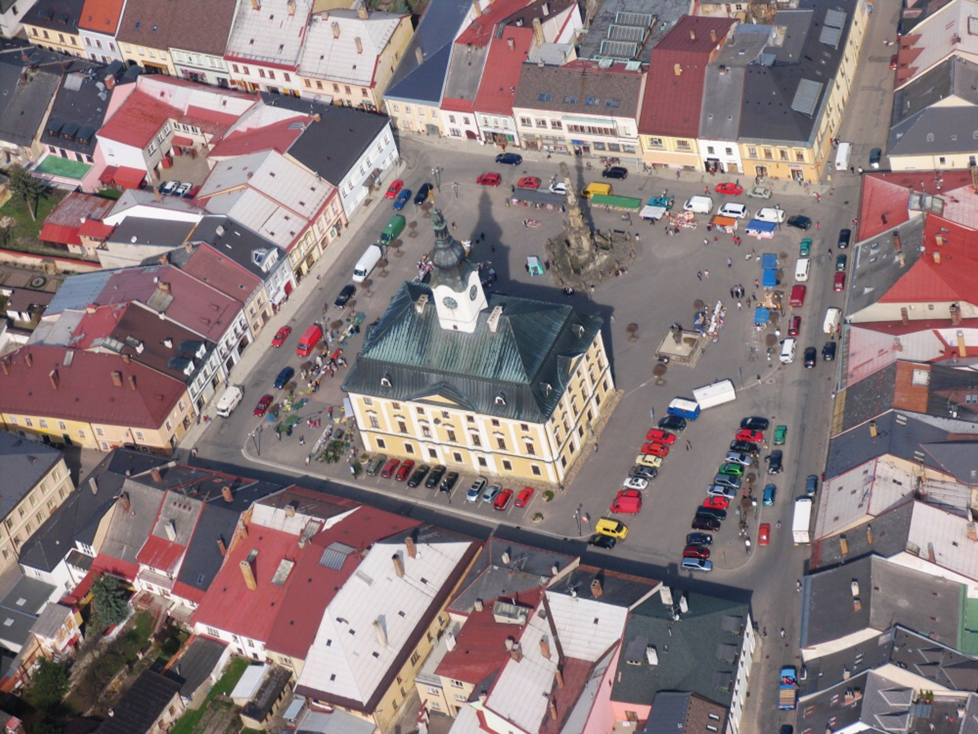 Letecký pohled na Poličku